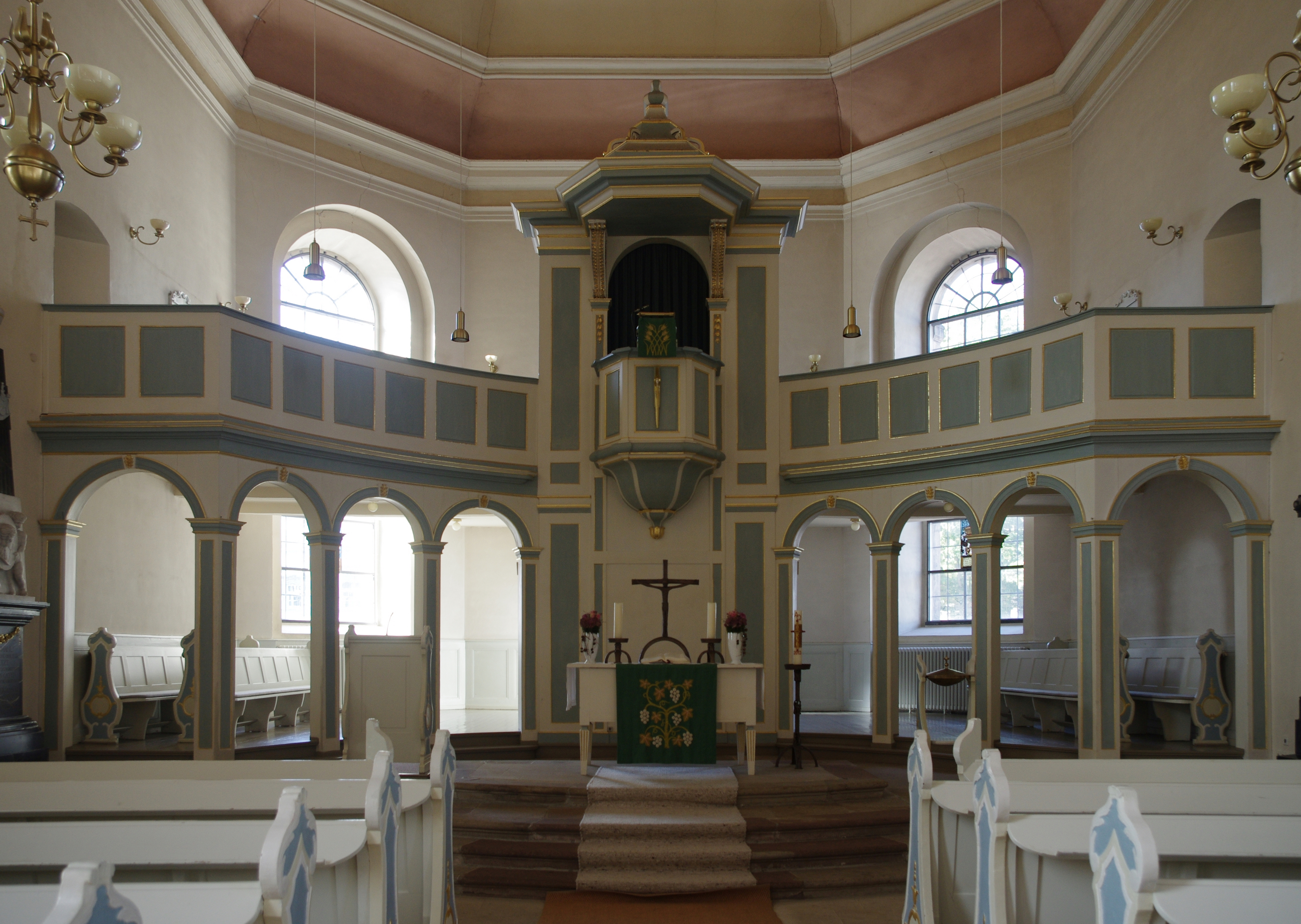 Bad Arolsen in Hessen. Blick in die Kirche mit Kanzelaltar und Empore.